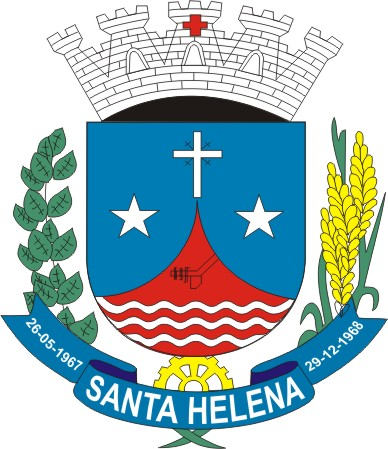 Foto do Brasão da República da cidade de Santa Helena Paraná